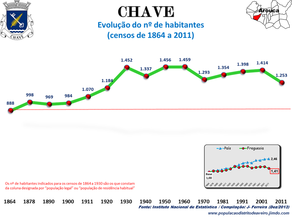 Evolução da População 1864 / 2011